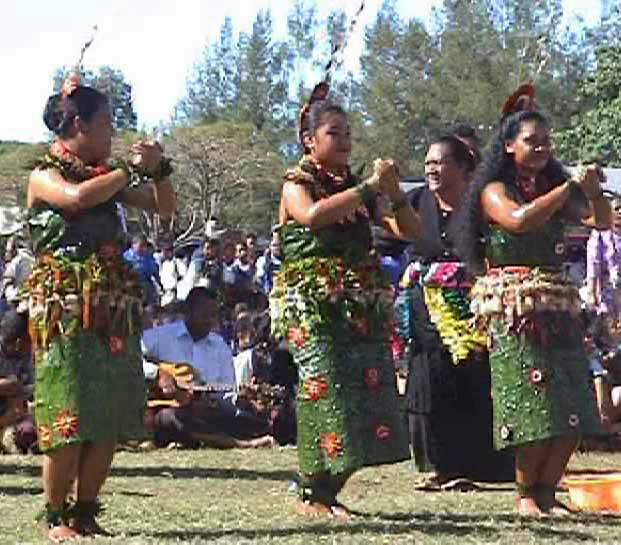 A Tongan group tauʻolunga dance